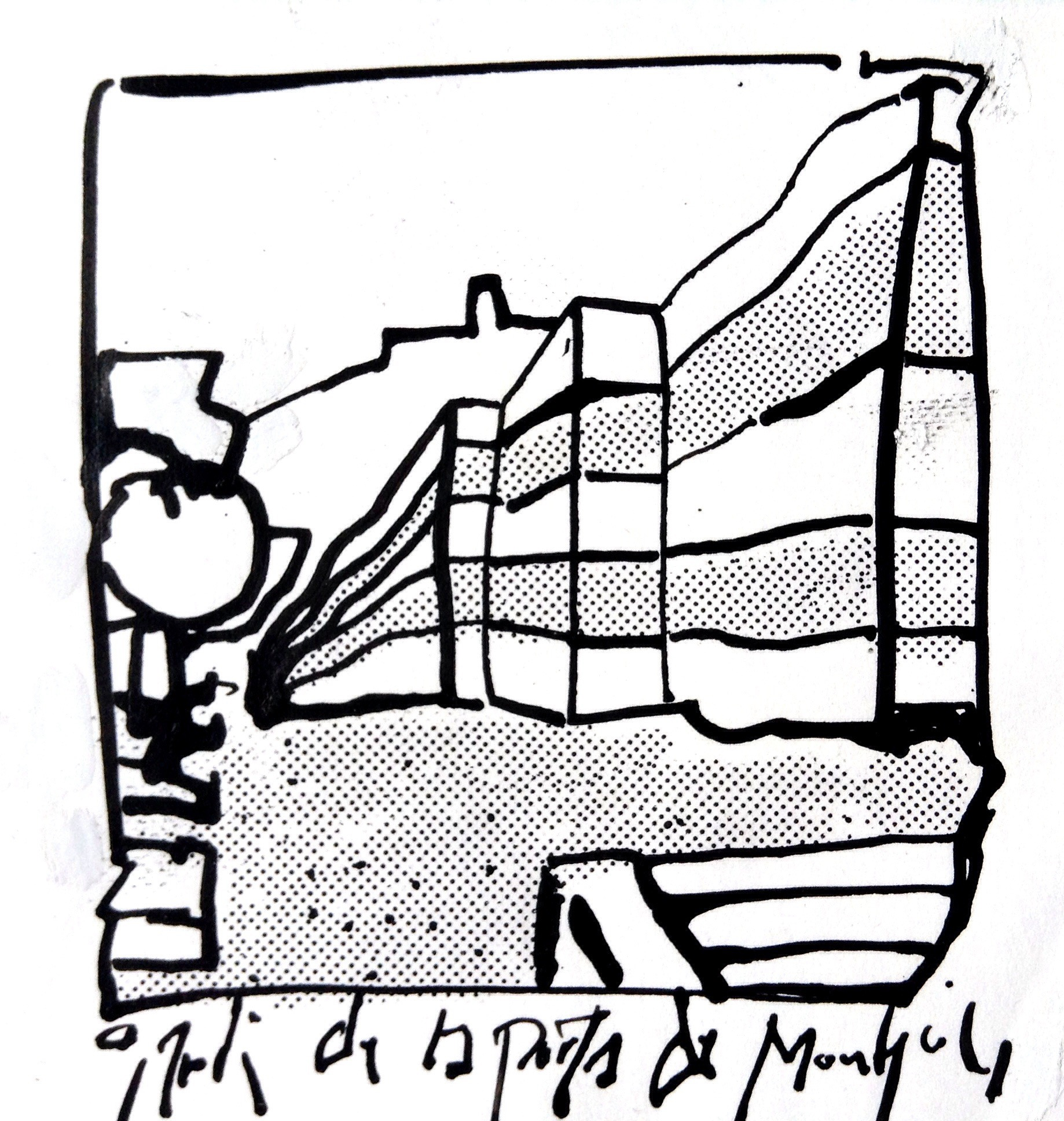 Dibux pluma mur Jardins de W.Benjamin - Daniel Navas